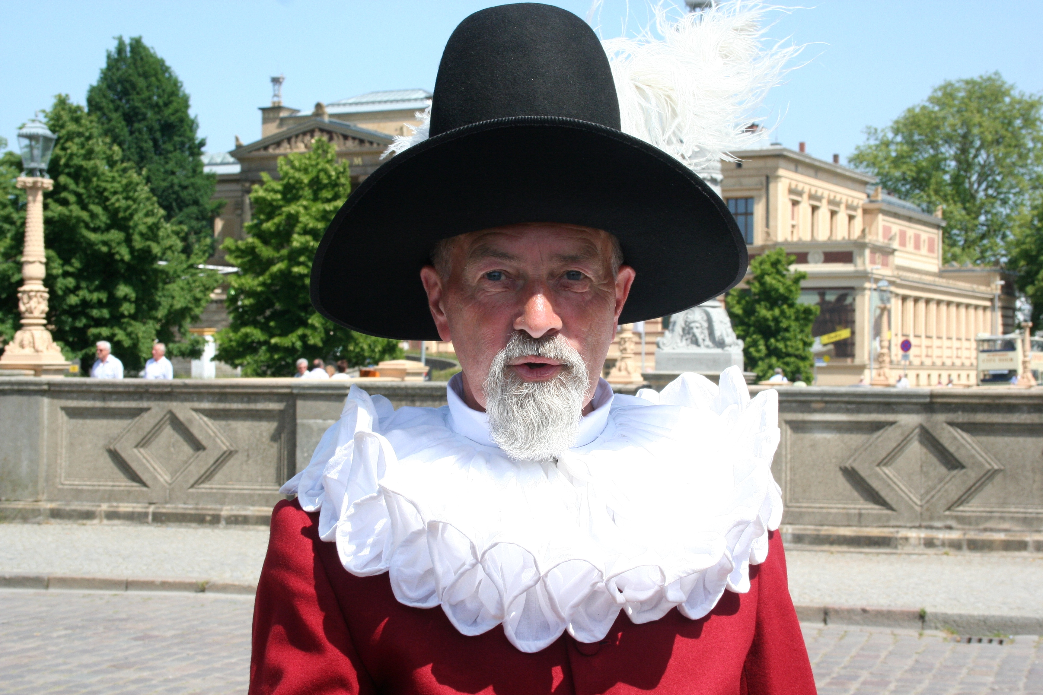 Schlossgeist Petermännchen